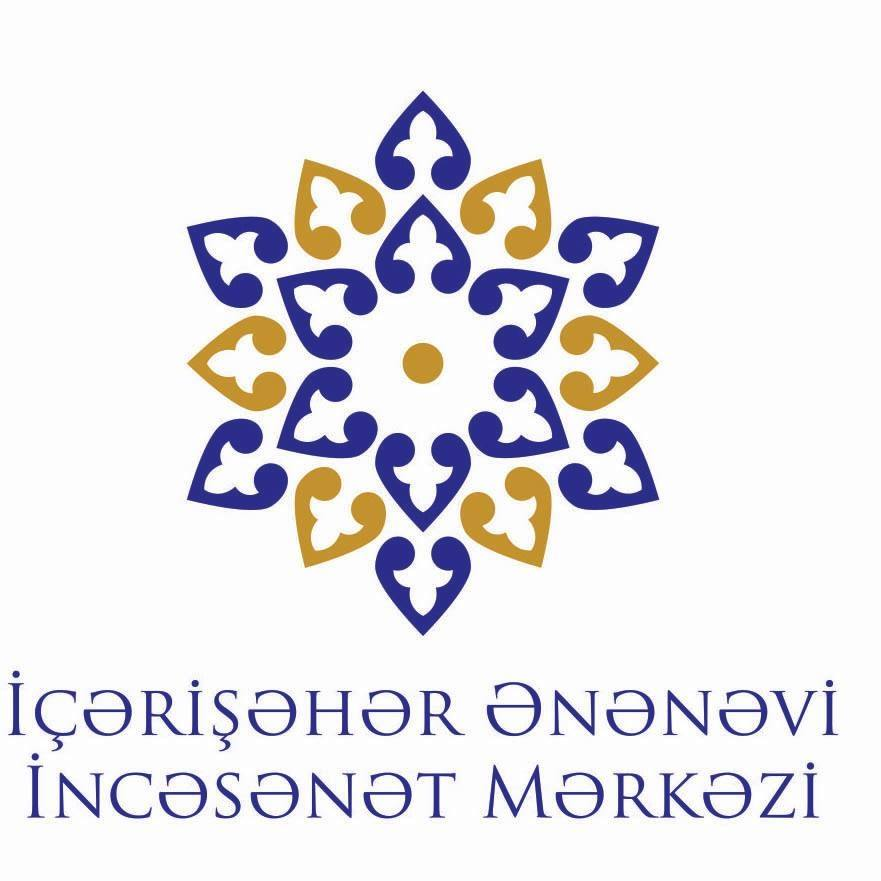 İçərişəhər Ənənəvi İncəsənət Mərkəzinin loqosu